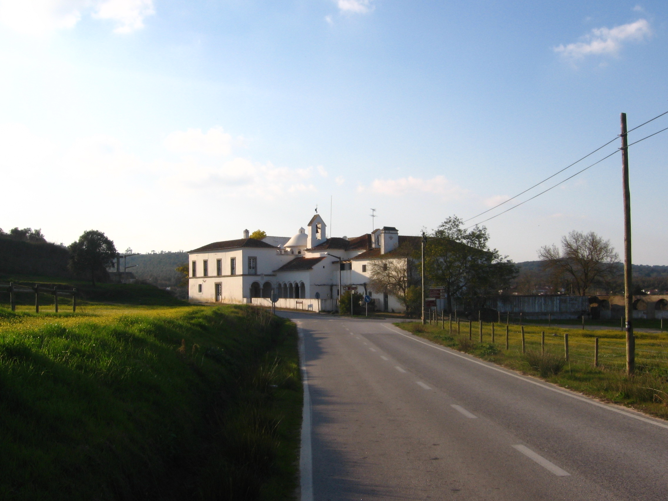 Convento do Bom Jesus de Valverde, Nossa Senhora da Tourega, Évora